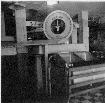 7. Die Milch wird in ein sich vor der Zweikammer-Zeigerwaage befindliches Doppelsieb geschüttet, gewogen und gelangt per Hebelfreigabe der Öffnungen in den Auffangbehälter.